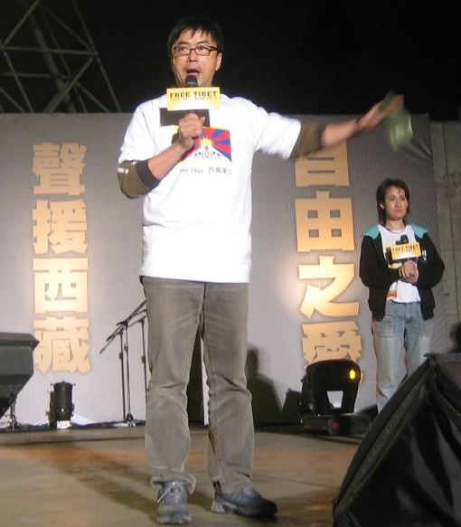 2008年3月19日